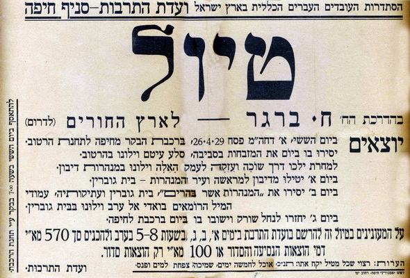 פרסום טיול לארץ החורים בהדרכת חיים ברגר, חוה"מ פסח 26 אפריל 1929 - חיים ברגר